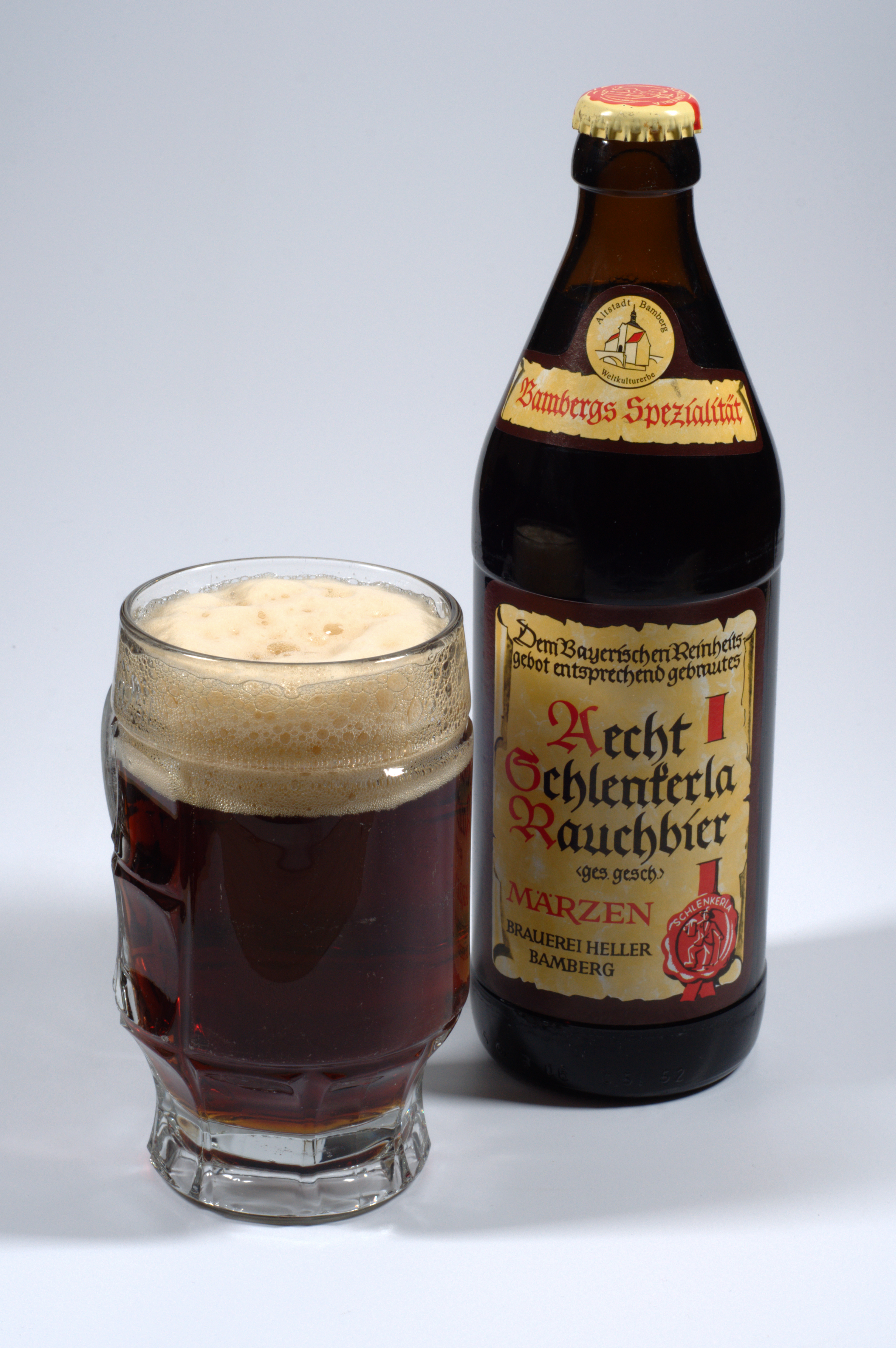 Flasche und Glas Aecht Schlenkerla Rauchbier Märzen der Brauerei Heller in Bamberg